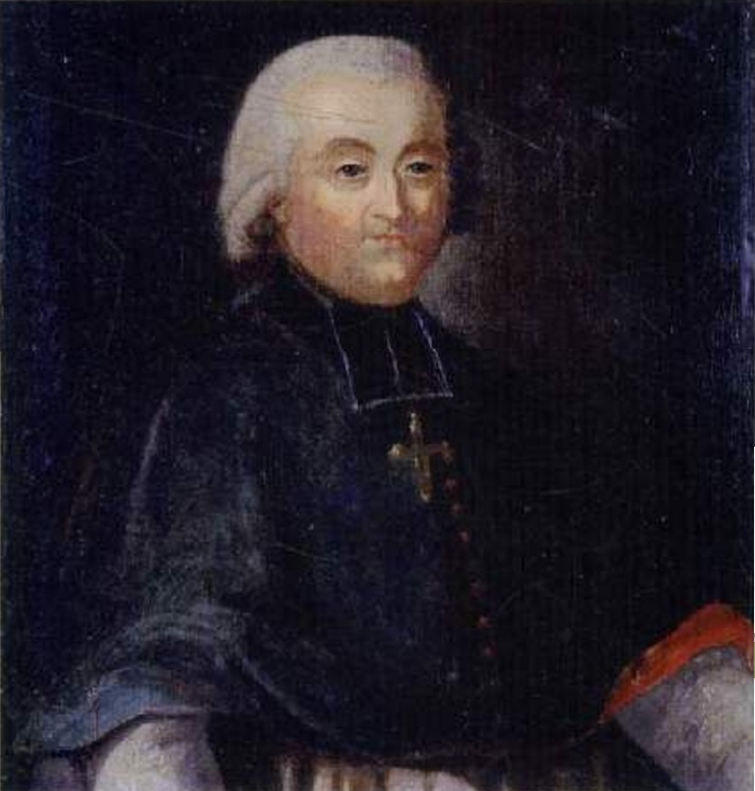 Étienne François Xavier des Michels de Champorcin, letzter Bischof von Toul